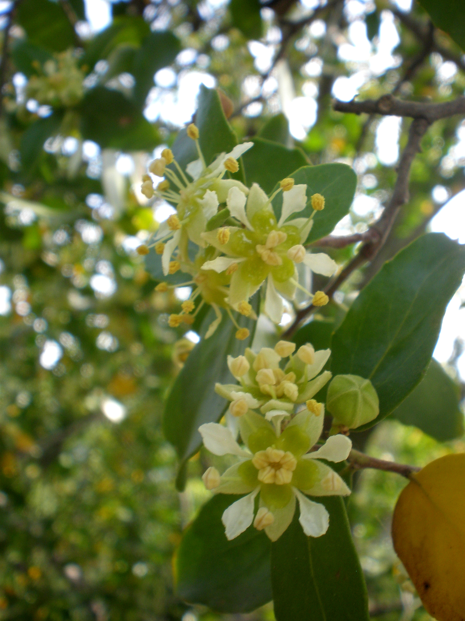 Jardín Botánico de Barcelona.